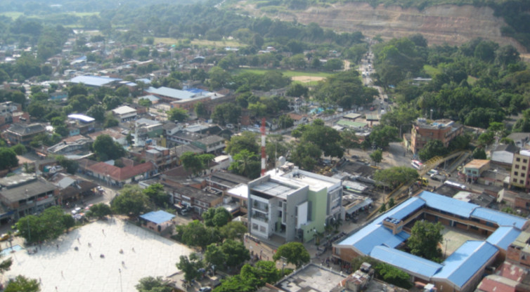 Sobrevuelo de Melgar